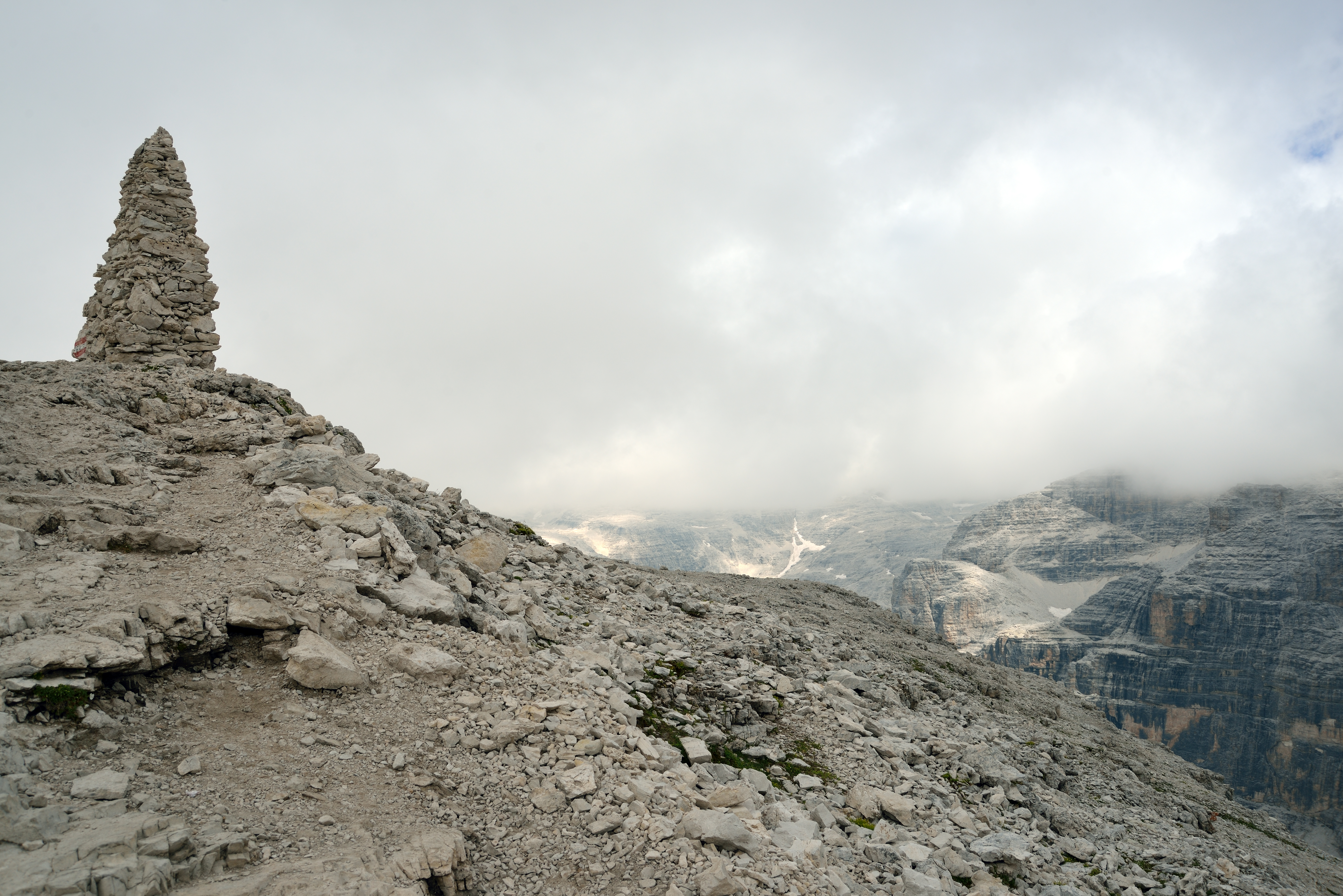 Cairn - Sella Group, Canazei, Trento, Italia